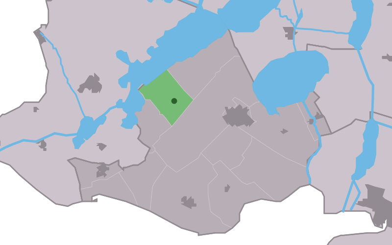 Kaartsje fan himrik fan Aldegea